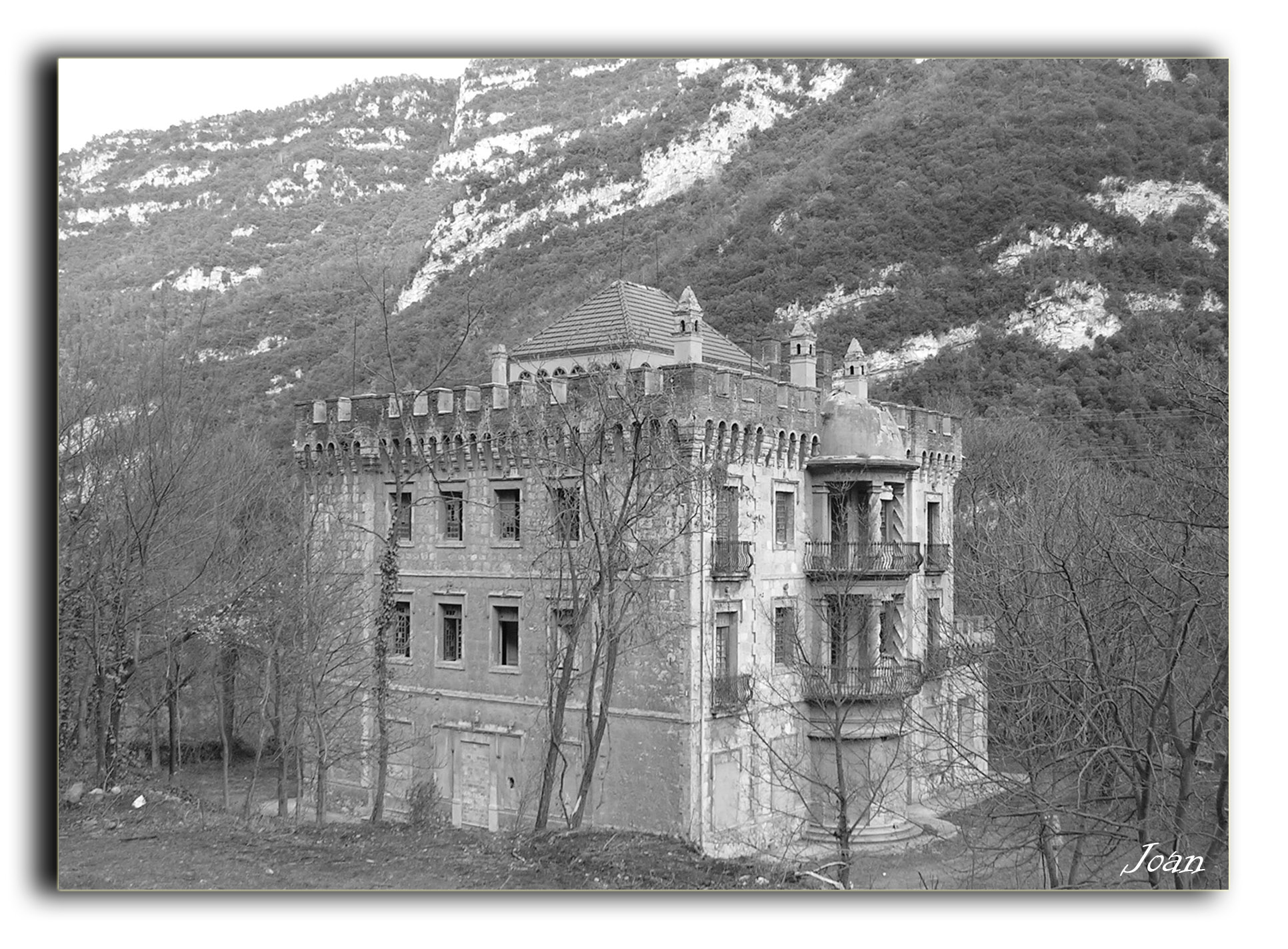 Torre del Comte de Fígols (Cercs)